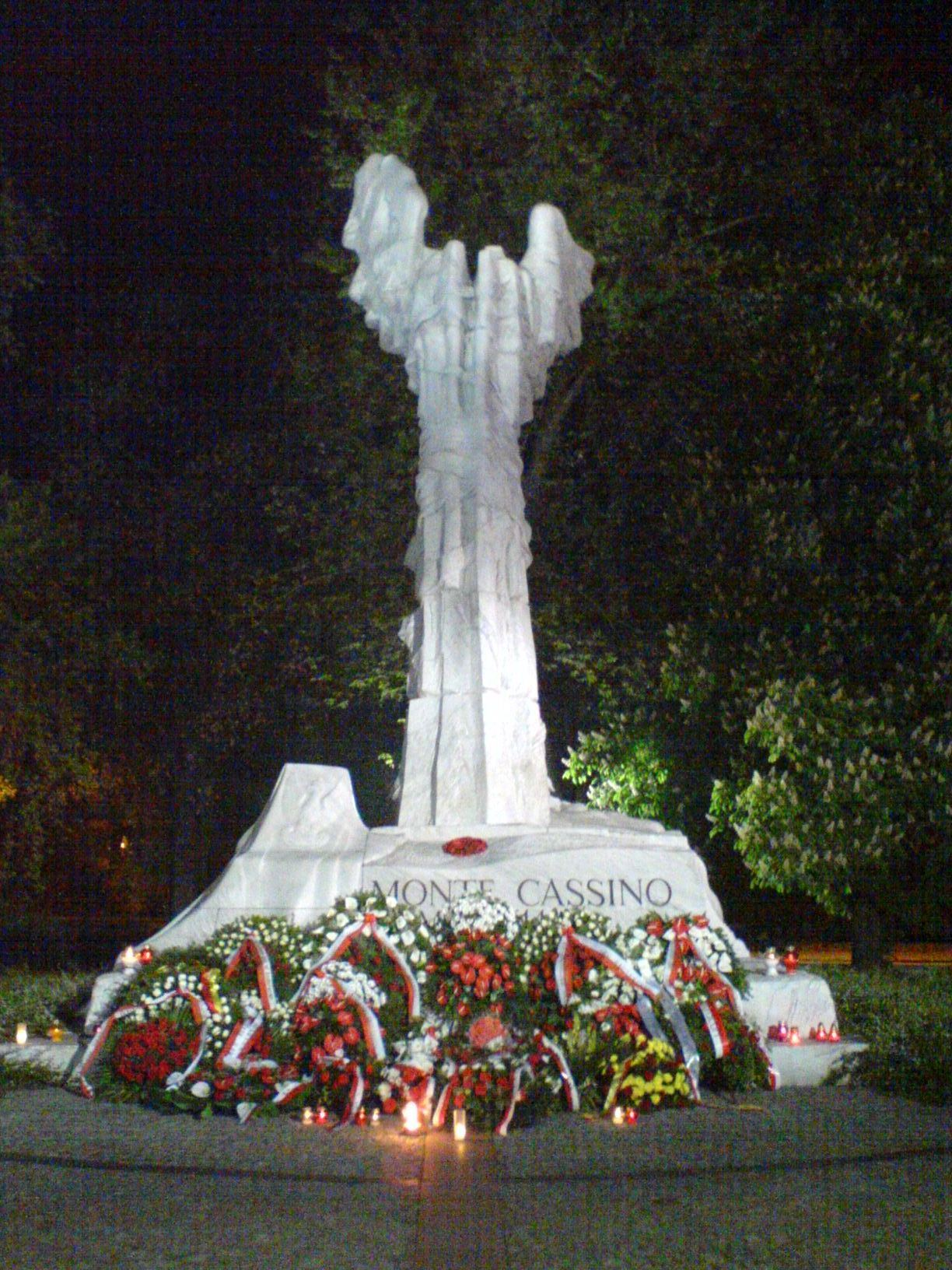 PL, Warszawa, Pomnik Monte Cassino, Ogród Krasińskich (nocą)